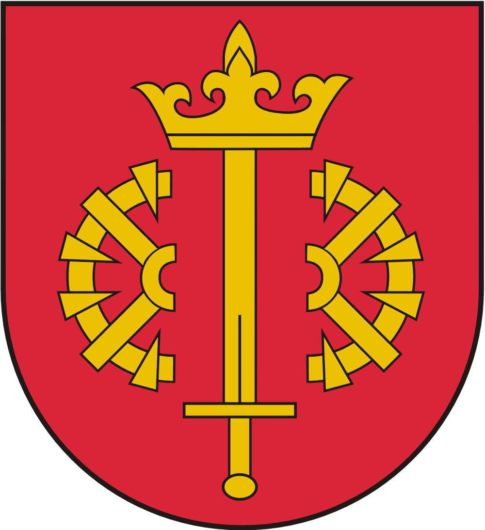 Nowy herb Ryglic